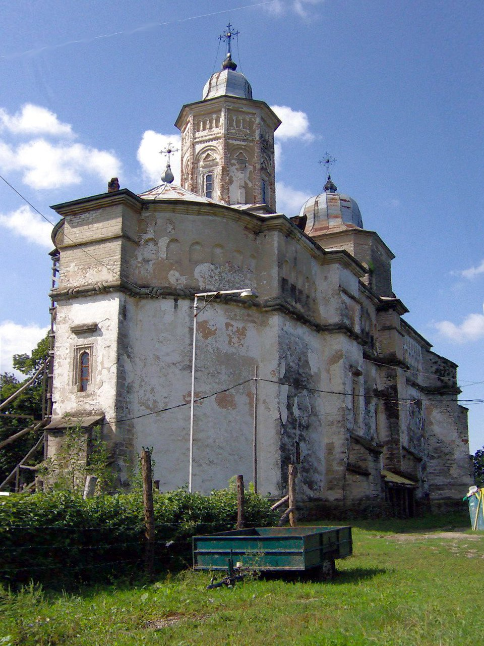 Mănăstirea Bârnova 01